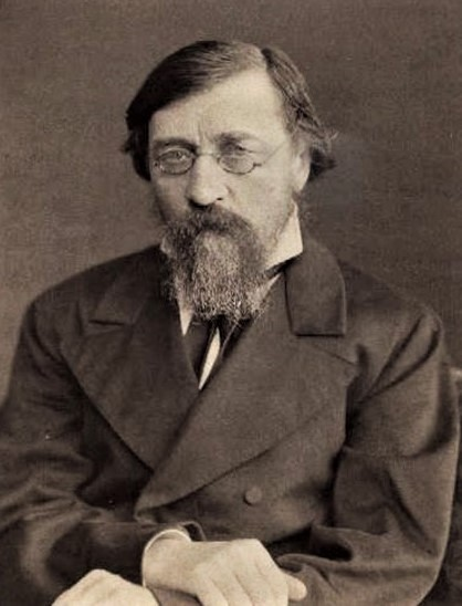 Nikolaj Černyševskij in una foto del 1888 ad Astrachan'